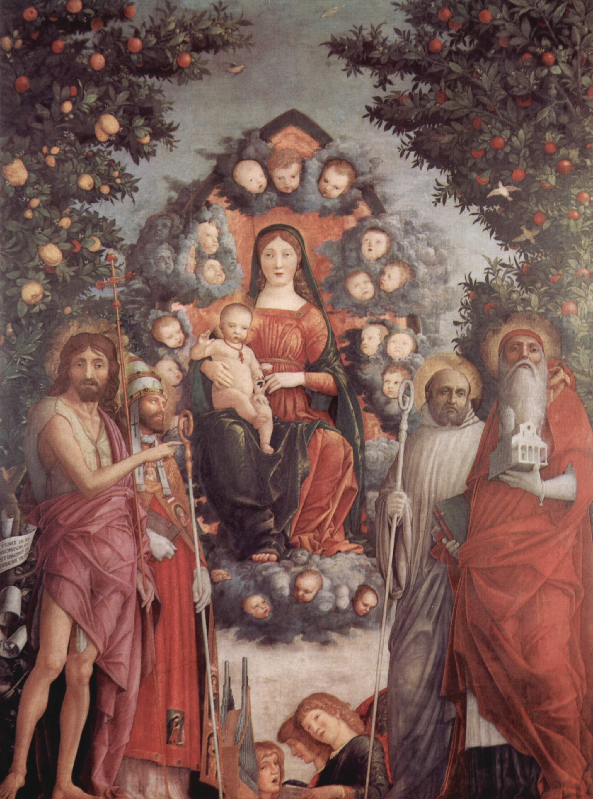 links: Hl. Johannes der Täufer, Hl. Gregor I. der Große, rechts: Hl. Benedikt und Hl. Hieronymus mit Kirchenmodell